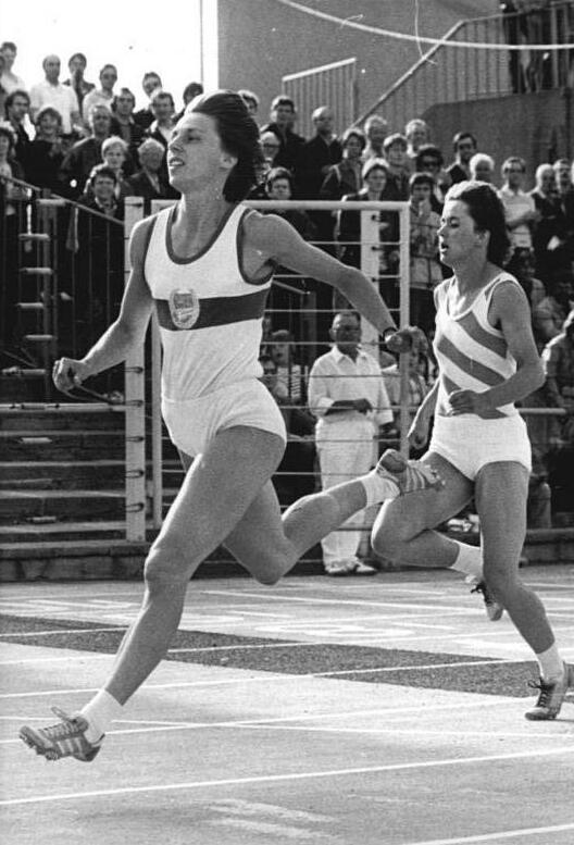 Marita Koch, Marlies Göhr ADN-ZB Thieme 20.5.84 Karl-Marx-Stadt:Leichtathletik-Sportfest - Weltklasseläuferinnen am Ziel des 200-m-Laufes der Frauen. Maritta Koch (SC Empor Rostock- links) siegt in 22,13 vor Marlies Göhr (SC Motor Jena- rechts), die persönliche Bestzeit mit 22,35 s erreichte.